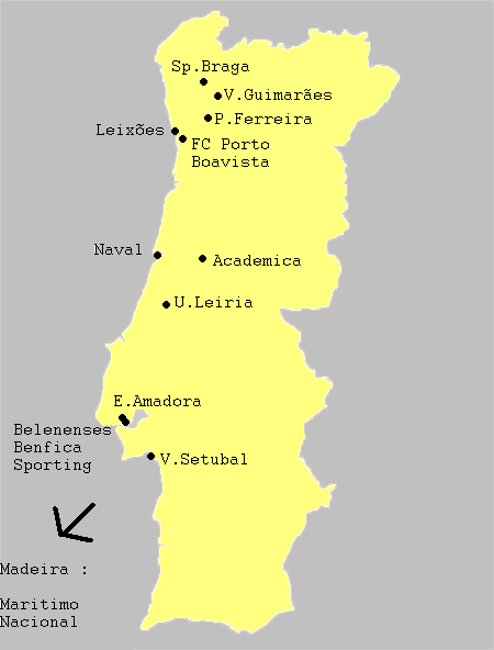 carte des clubs du championnat du portugal de football 2007-2008